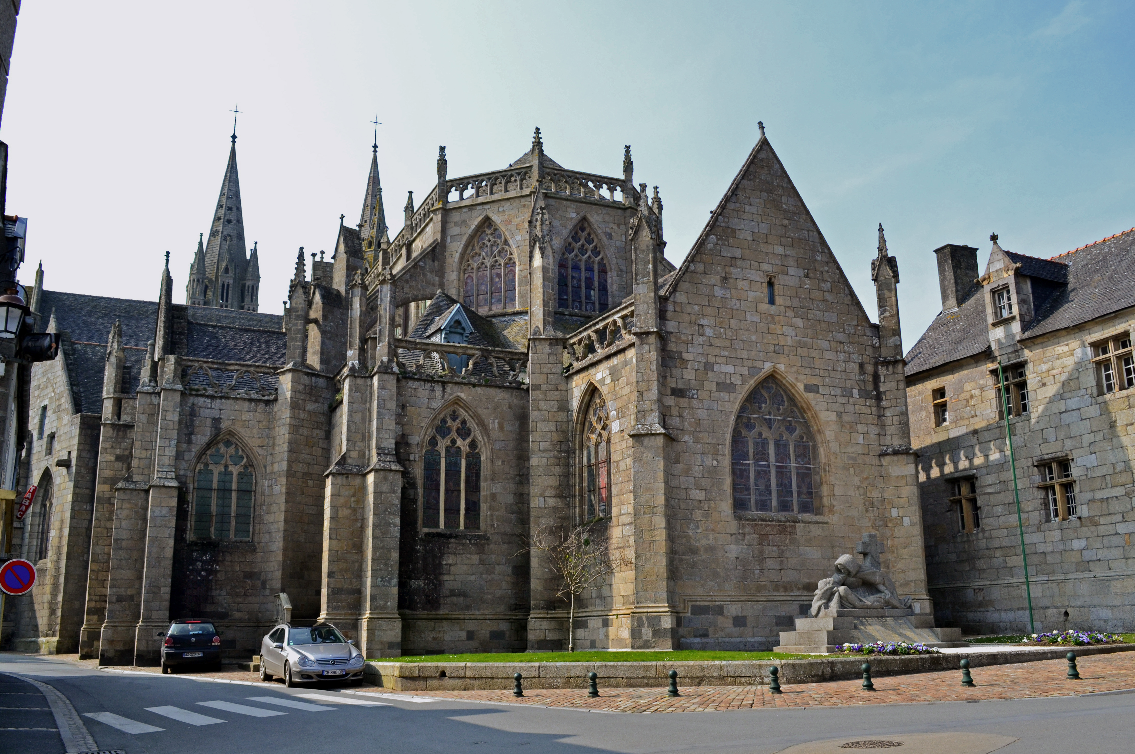 Côté est de la cathédrale Saint-Paul-Aurélien à Saint-Pol-de-Léon (Finistère).